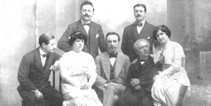 Las dramaturgos españoles Joaquín y Serafín Álvarez Quintero con el elenco que representó el estreno de su obra Los leales (1914): los actores José Santiago, Nieves Suárez, María Palou y demás reparto.